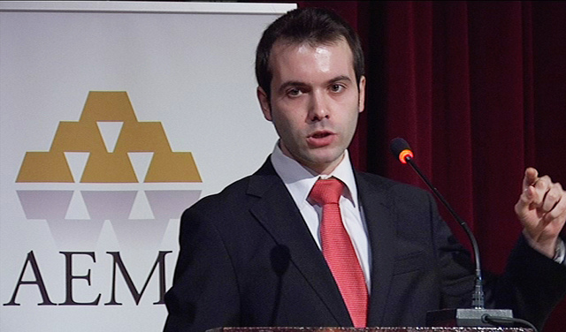 Economista español